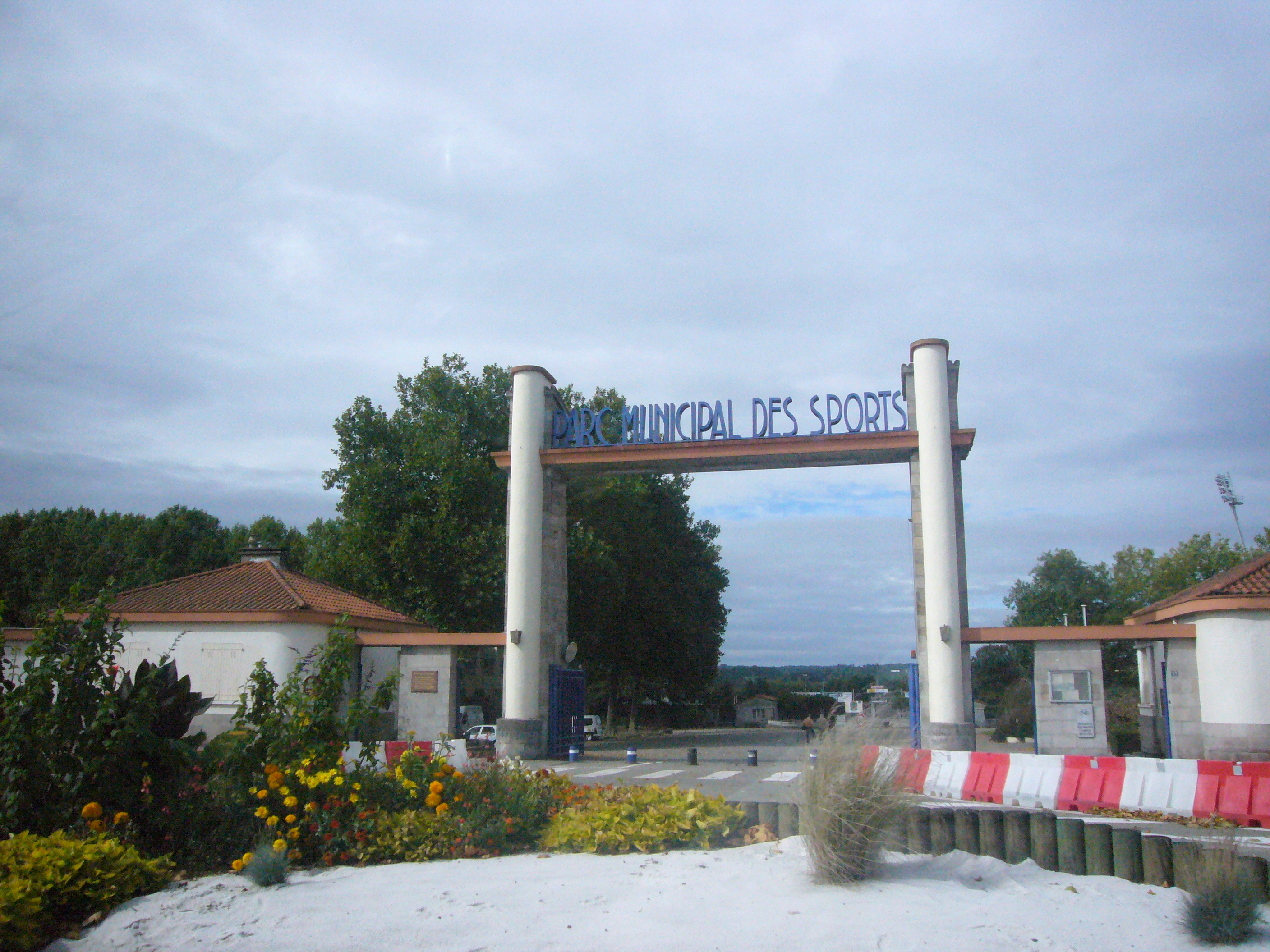 Parc municipal des sports de Beaublanc (Limoges, 87, France)